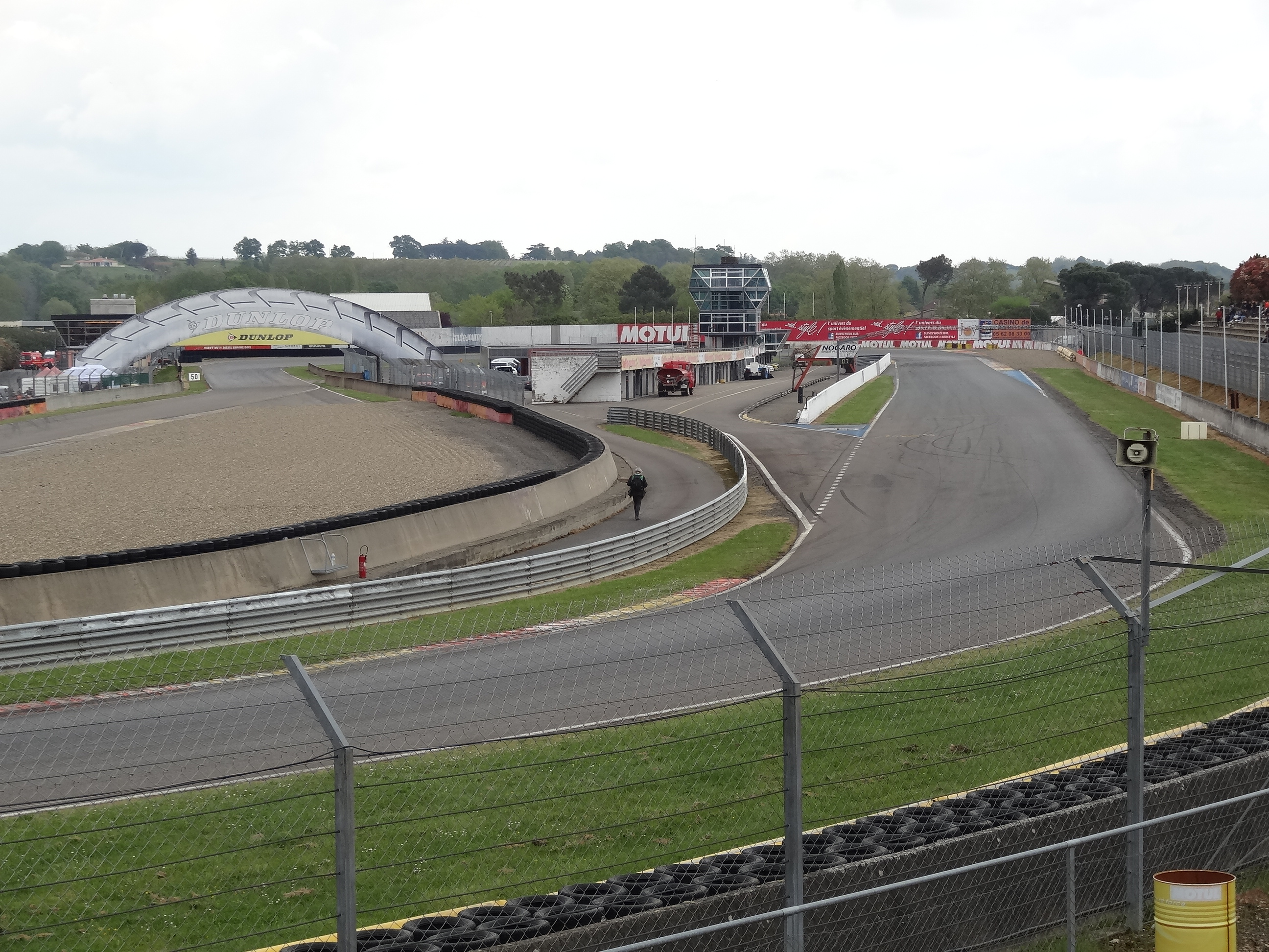 Superbike 2016 Nogaro-27 Circuit Paul Armagnac en avril 2016.